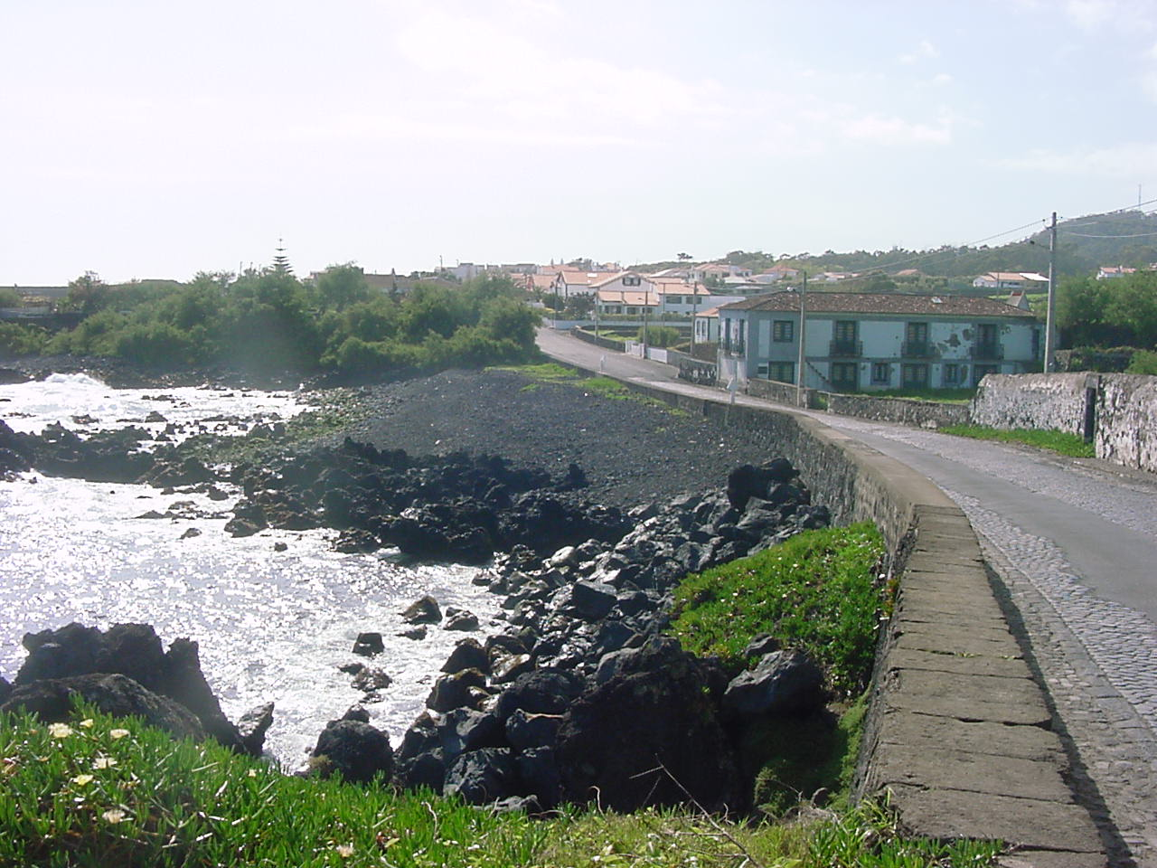 Enseada das Mêrces, São Mateus da Calheta, ilha Terceira, Açores.